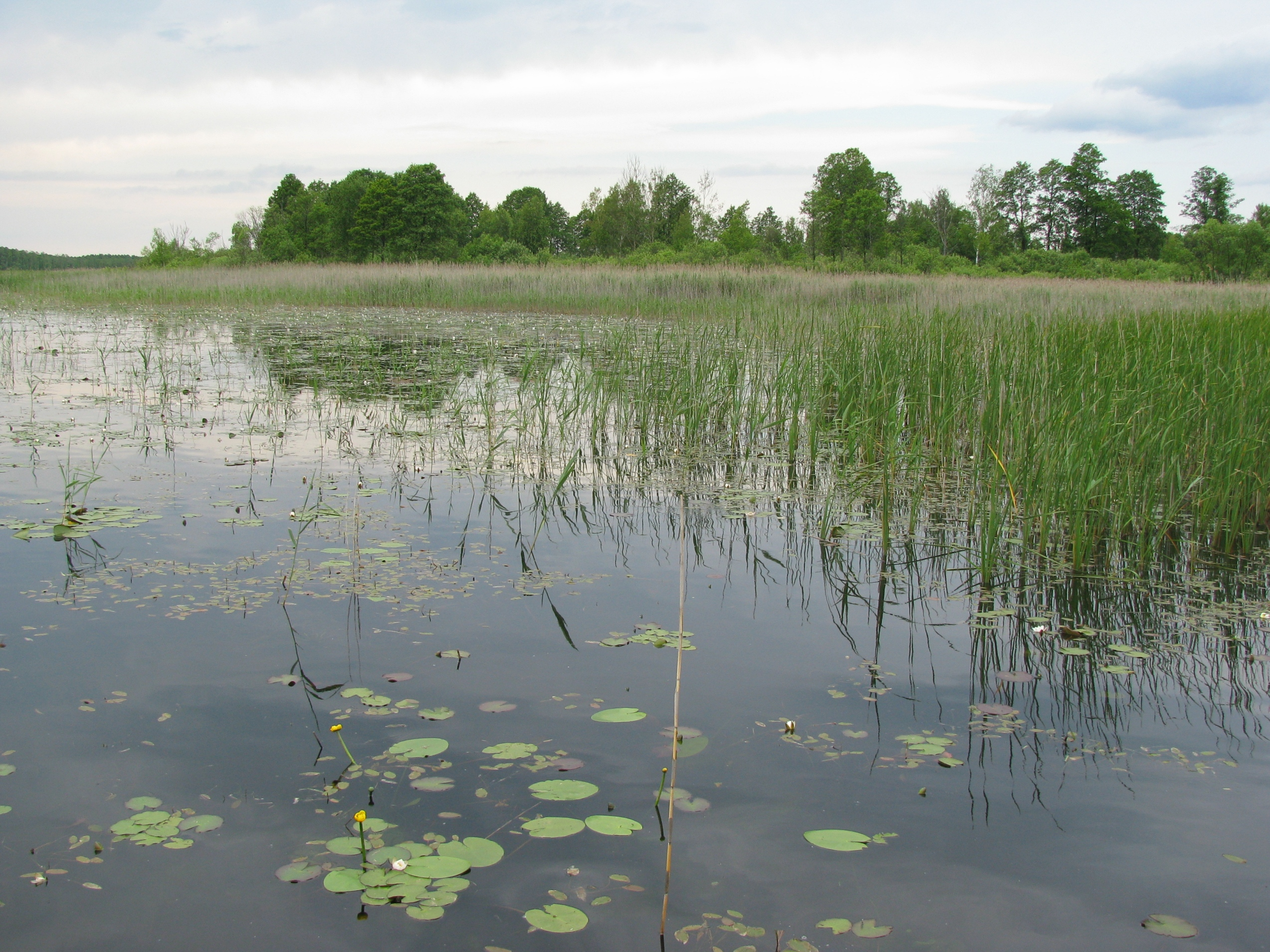 Jezioro Łukie w Poleskim Parku Narodowym.